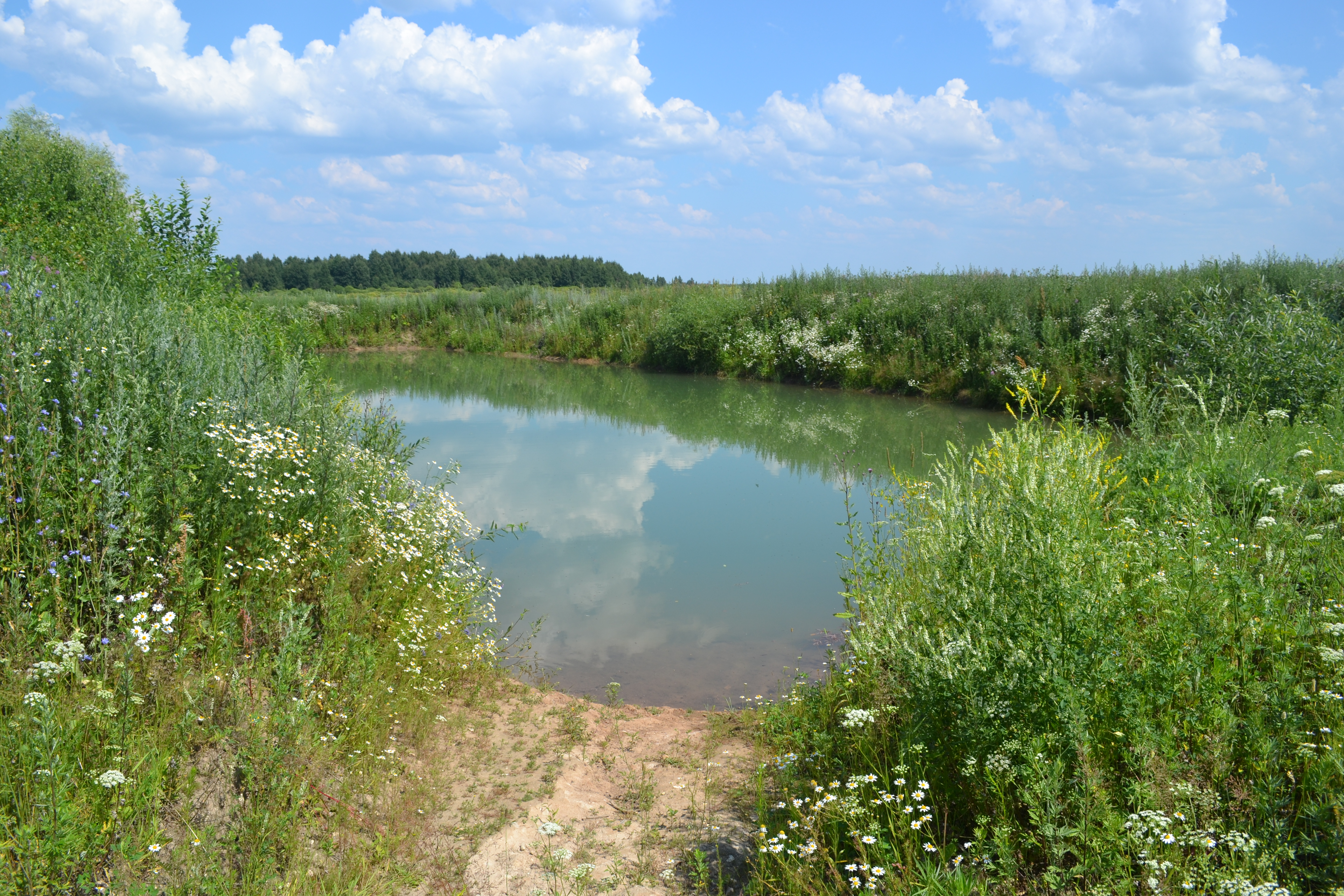 Пруд в деревне Зименки (Шатурский район)